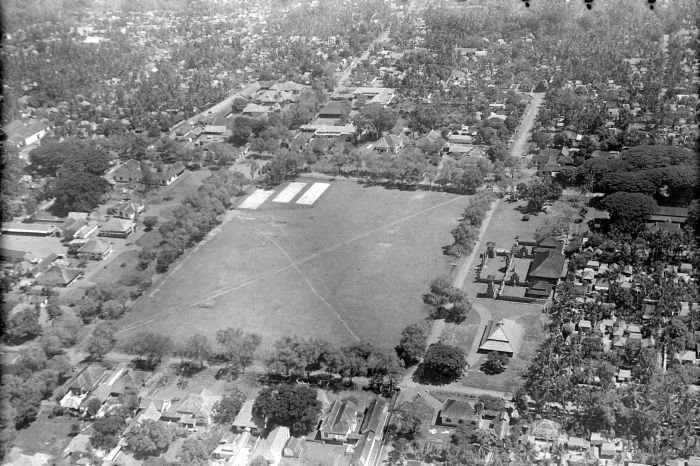 Negatief. Luchtfoto van het stadsplein te Den Pasar, Bali (rechts: Balimuseum en Daerah-kantoor; midden boven: ambtswoning van het Daerah-hoofd; midden achter: het Balihotel)